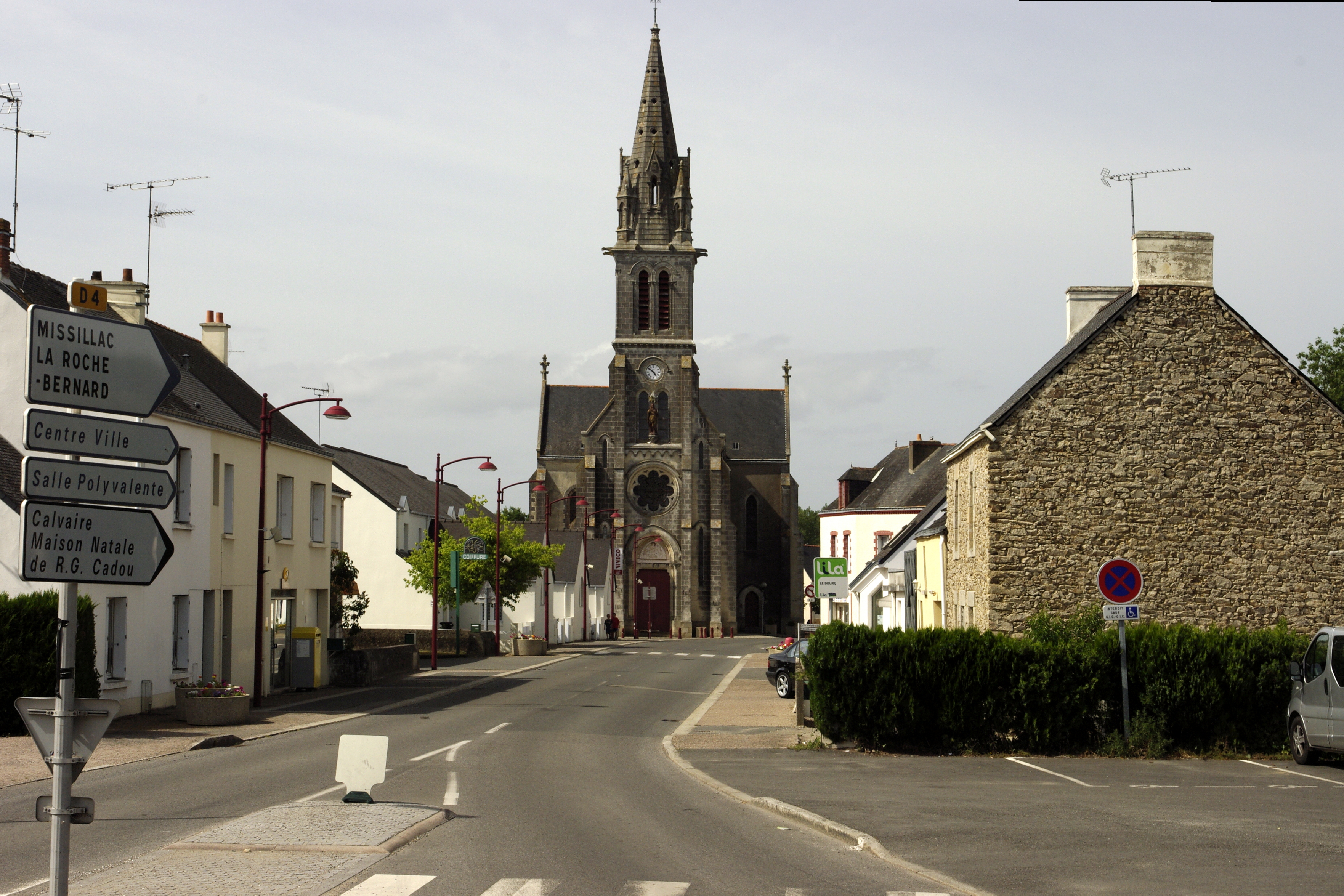 Sainte Reine-de-Bretagne, 44.